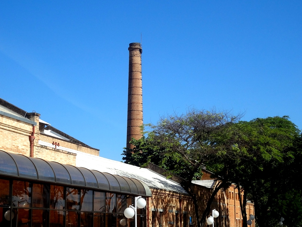 Antiga fábrica Swift em São José do Rio Preto